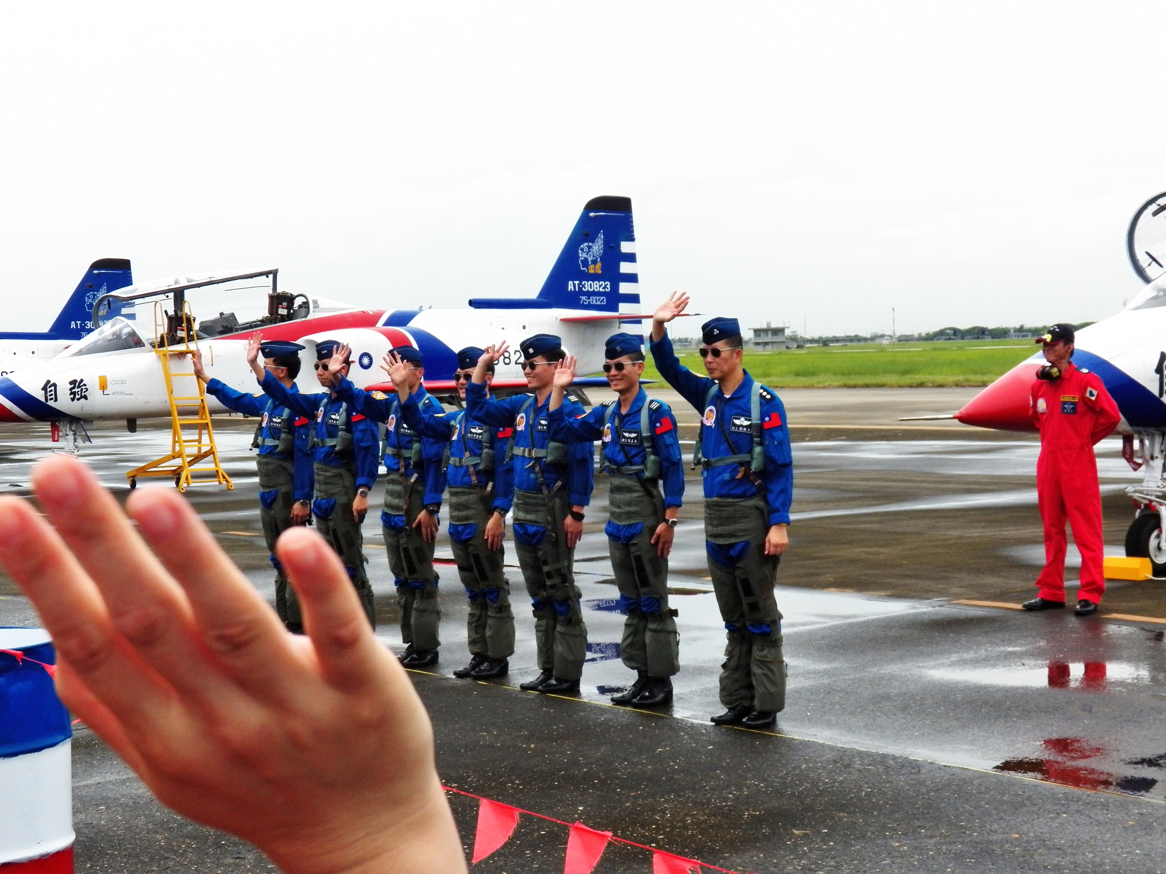 特技飛行表演結束後，雷虎小組成員下機一字排開，揮手接受民眾致意攝影。